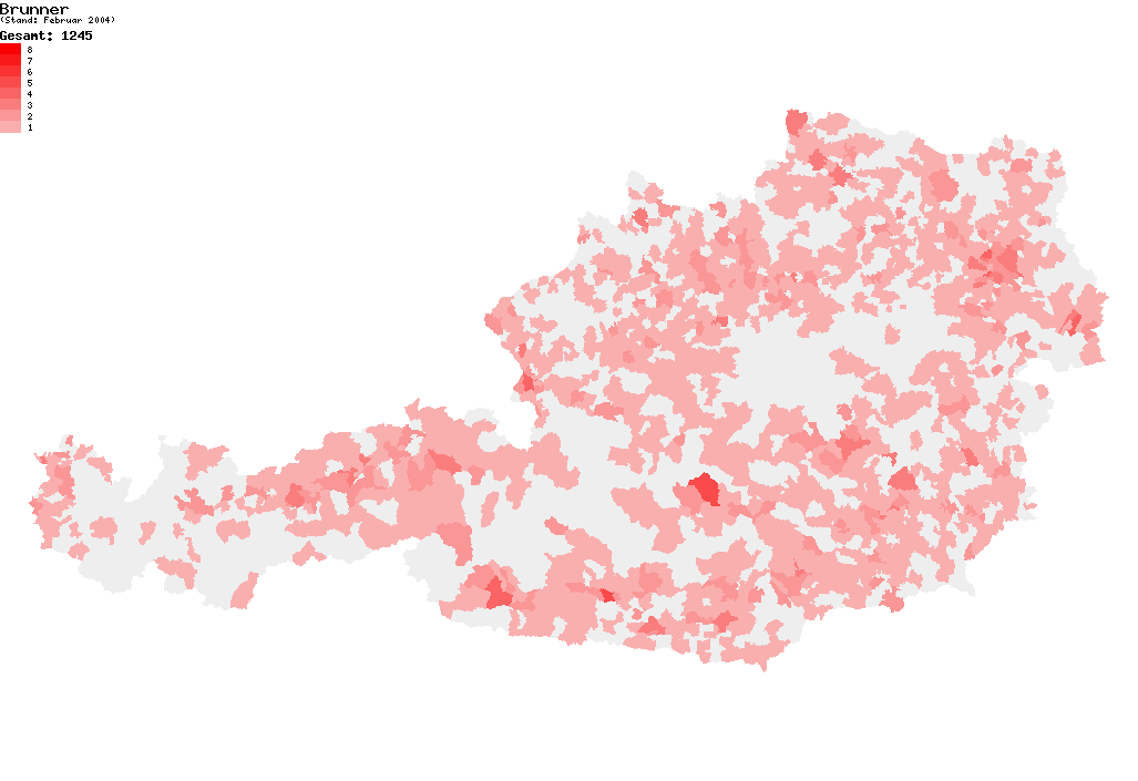 Verteilung des Nachnamens Brunner in Österreich nach dem Telefonbuch mit Stand vom Februar 2004